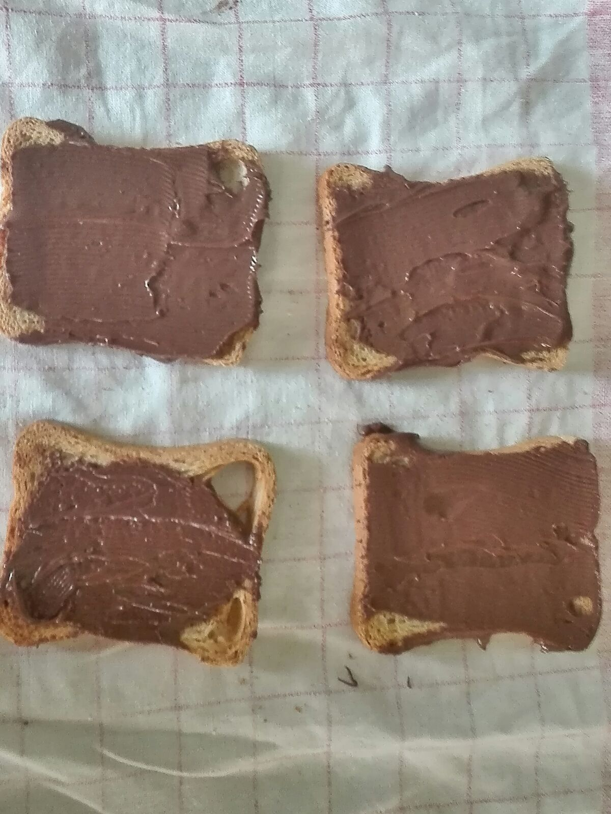 Fette biscottate ricoperte da uno strato di Nutella.